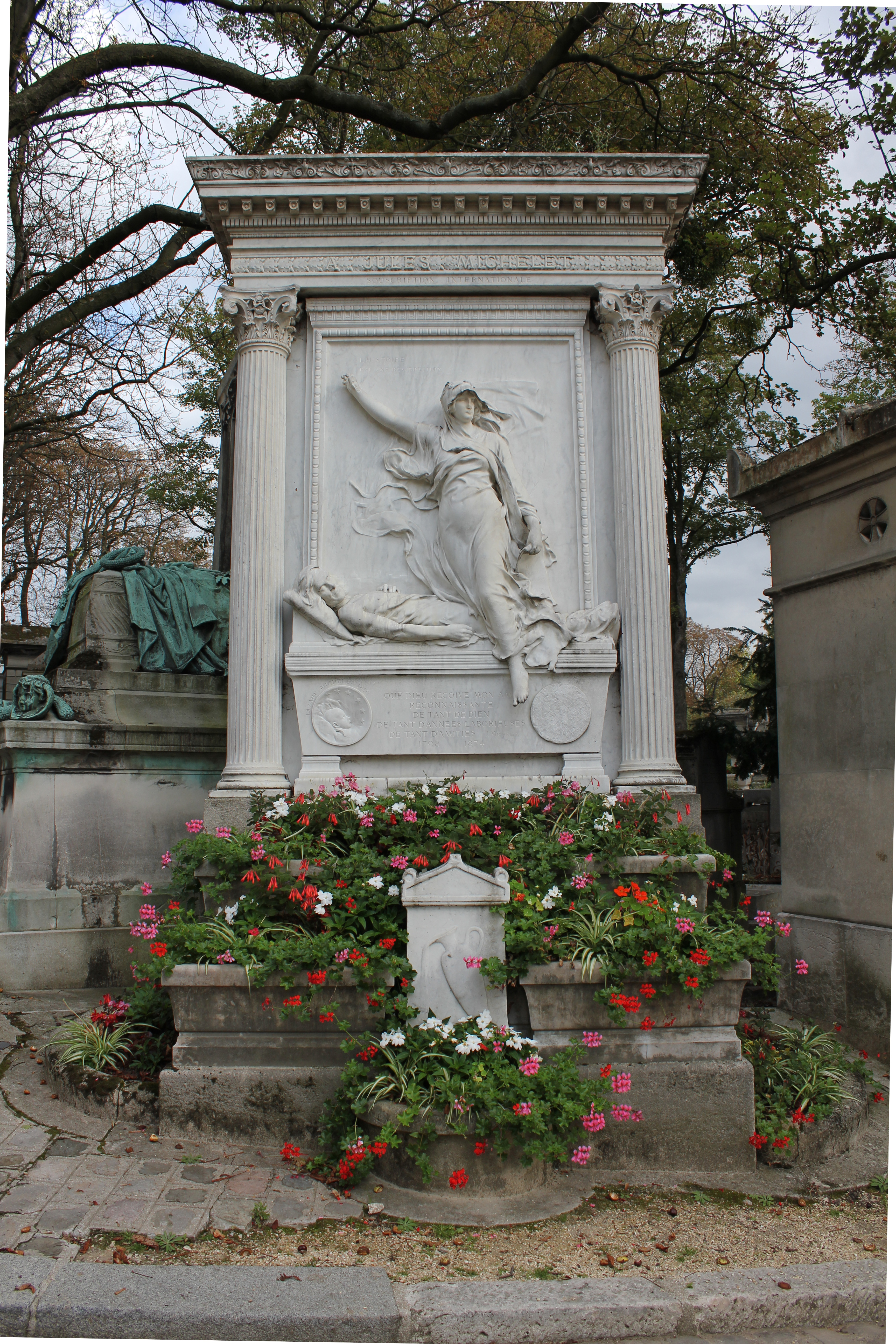 Sépulture de Jules Michelet (1798-1874), historien. « C'est un élégant édicule grec, en marbre, une stèle encadrée de deux colonnes corynthiennes et d'un entablement dont la frise est ornée de rameaux, d'insectes et d'oiseaux. De la stèle se détache un groupe qui s'ajoutera à la liste des chefs d'œuvre de Mercié. Michelet est étendu sur un sarcophage, la poitrine découverte, le reste du corps enveloppé d'un suaire, la tête appuyée sur un oreiller qui inonde sa longue chevelure, la main gauche posée sur le cœur, le bras droit étendu le long du corps, la main tenant encore la plume. Les yeux sont fermés, les lèvres ont le sourire que donne au juste le contentement intérieur ; tout le visage respire une admirable sénérité. On a écrit au dessous cette phrase du testament du grand historien : Que Dieu reçoive mon âme reconnaissante de tant de bien, de tant d'années laborieuses, de tant d'amitié ! Au dessus du sarcophage, l'Histoire, sous la figure d'une jeune femme d'une beauté sévère, s'élance au milieu des mille plis d'une draperie d'une légèreté aérienne. La main gauche tient un rouleau sur lequel on lit : Histoire de France ; la main droite, dans un geste qui semble entraîner tout le corps vers les régions supérieures, indique cette phrase célèbre gravée dans le haut de la stèle : L'histoire est une résurrection. » (Le Temps, 14 juillet 1882.) vue générale de la face avant